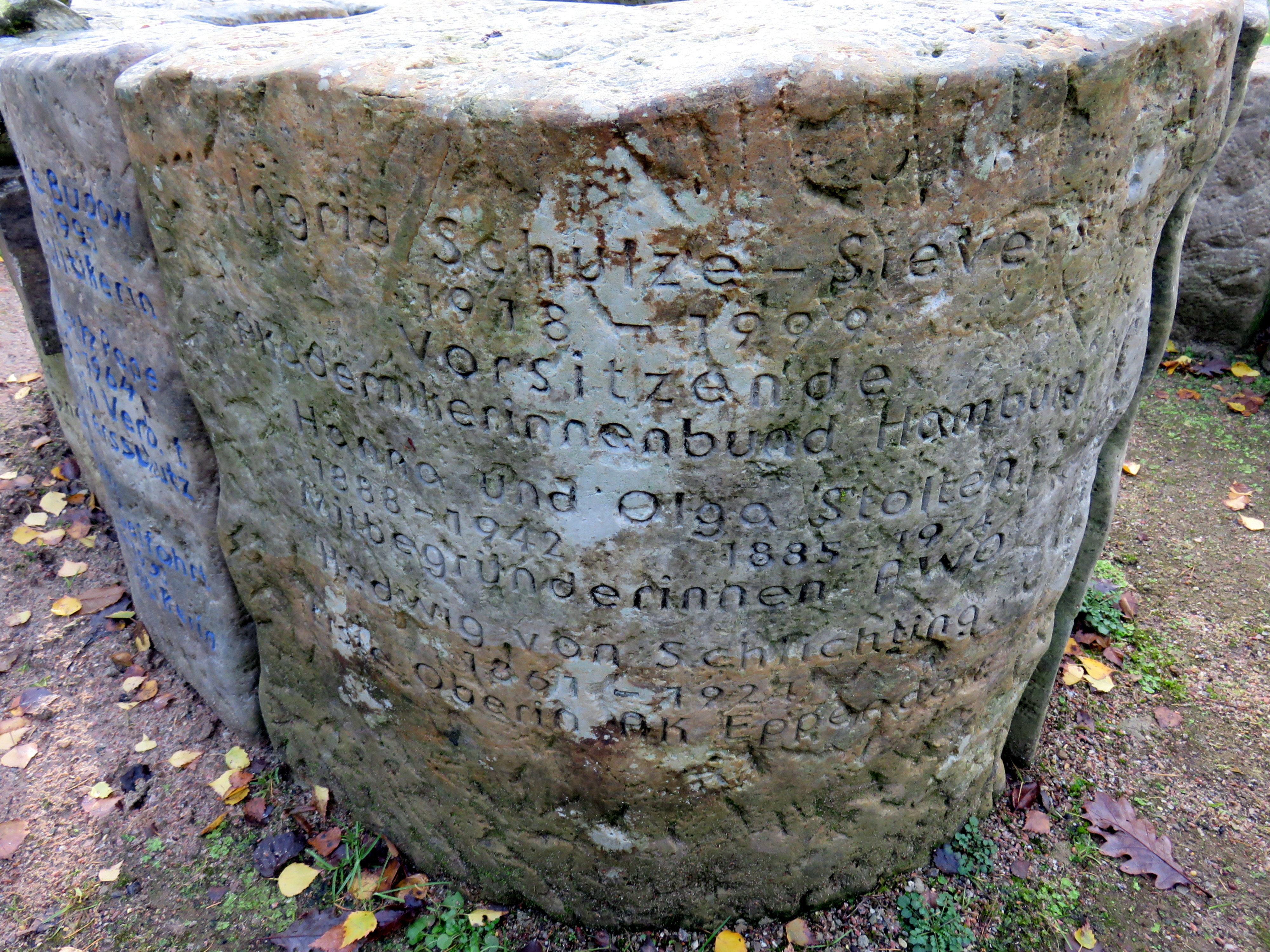 Gedenkstein für Ingrid Schulze-Sievers, den Schwestern Hanna und Olga Stolten sowie Hedwig von Schlichting in der Erinnerungsspirale im Bereich des Gartens der Frauen auf dem Ohlsdorfer Friedhof in Hamburg-Ohlsdorf.